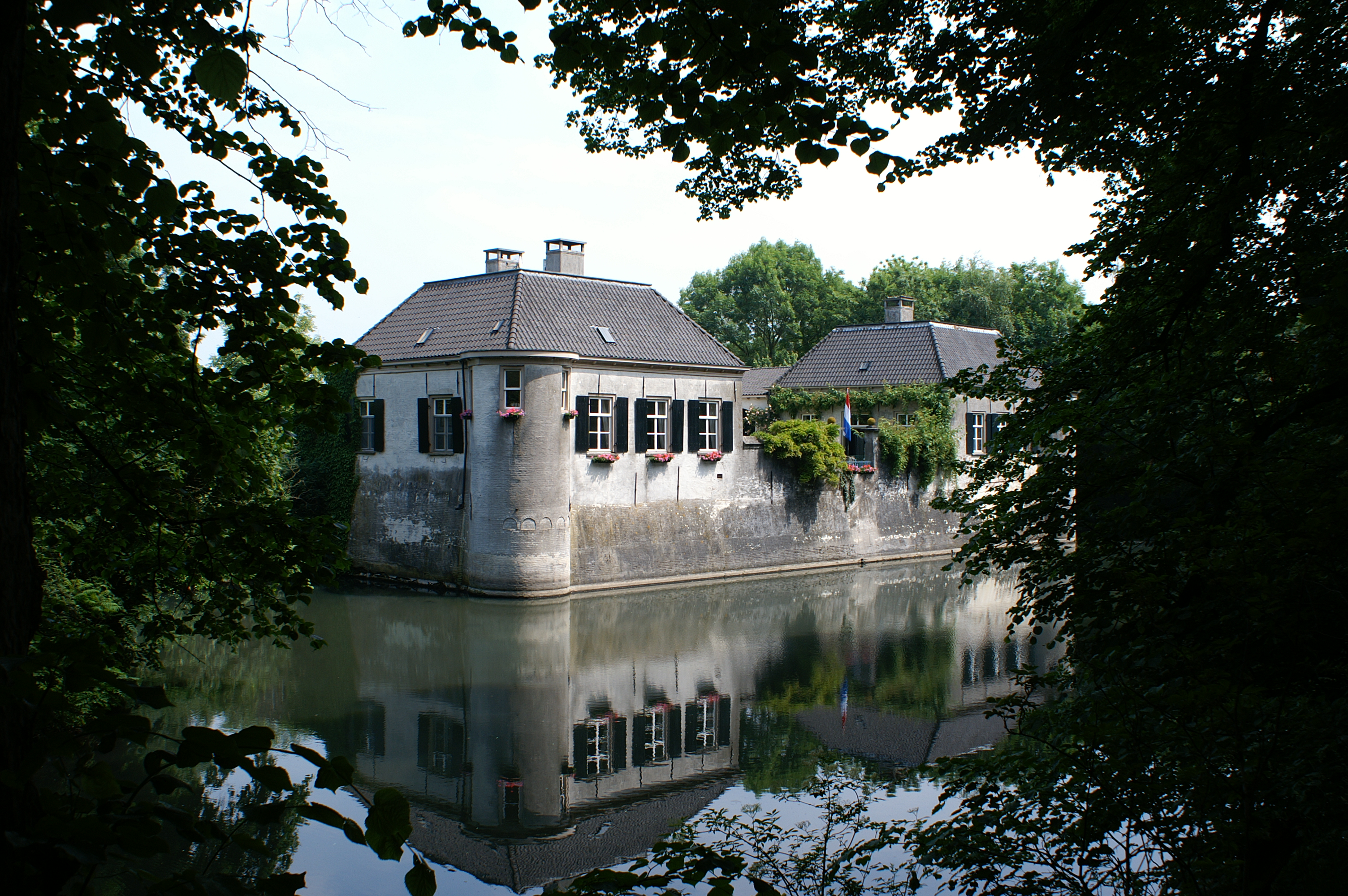 De bouwhuizen van het verdwenen kasteel Oijen.